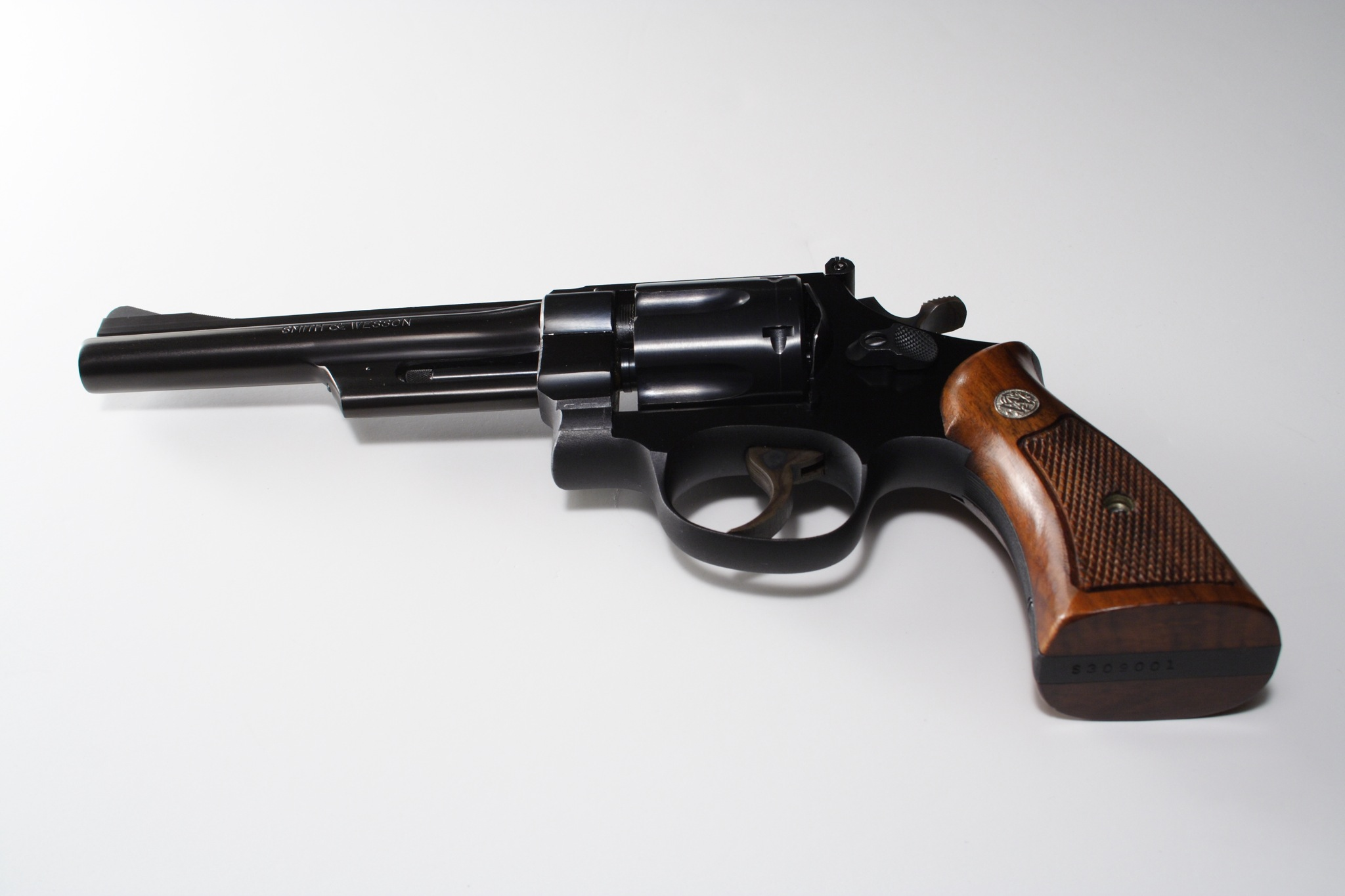 S&W 28-2 6" Barrel 3